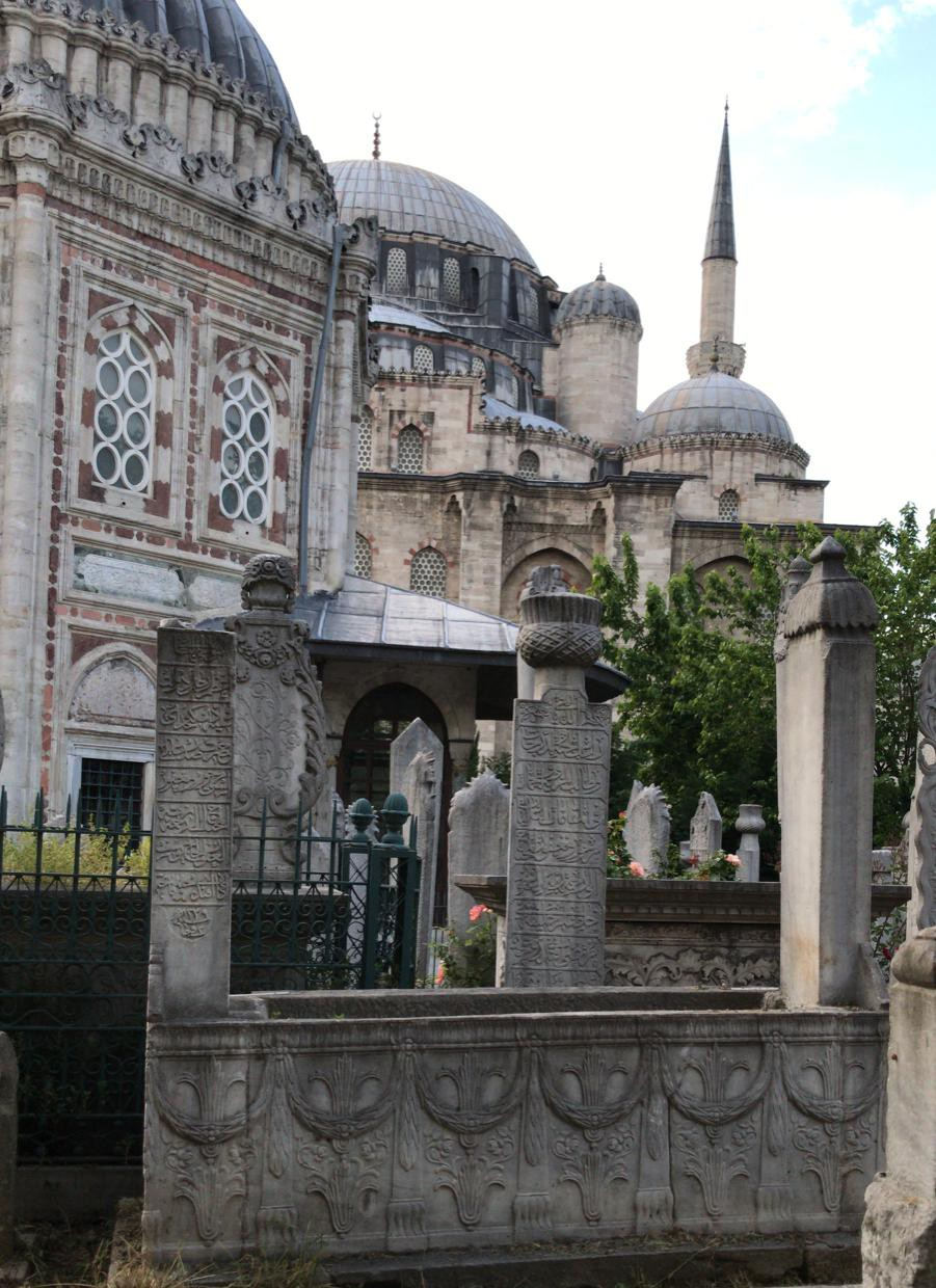 Osmanlı Devletinin İngiltere nezdinde ilk temsilcisi/elçisi Yusuf Agah Efendi'nin Şehzade Cami Haziresinde yer alan kabri.